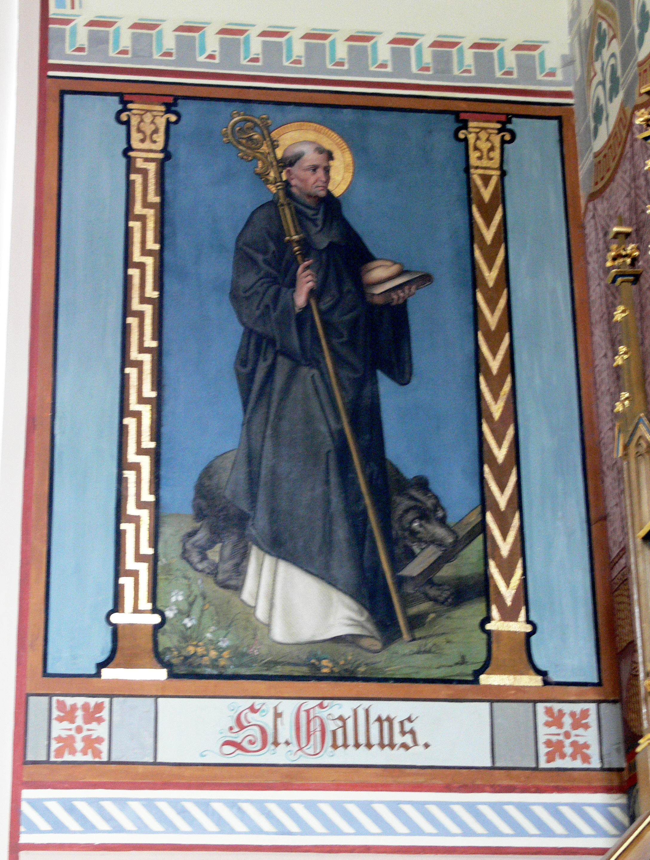 Filialkirche St. Venantius, Pfärrenbach, Gemeinde Horgenzell Wandgemälde im Kirchenschiff: Hl. Gallus